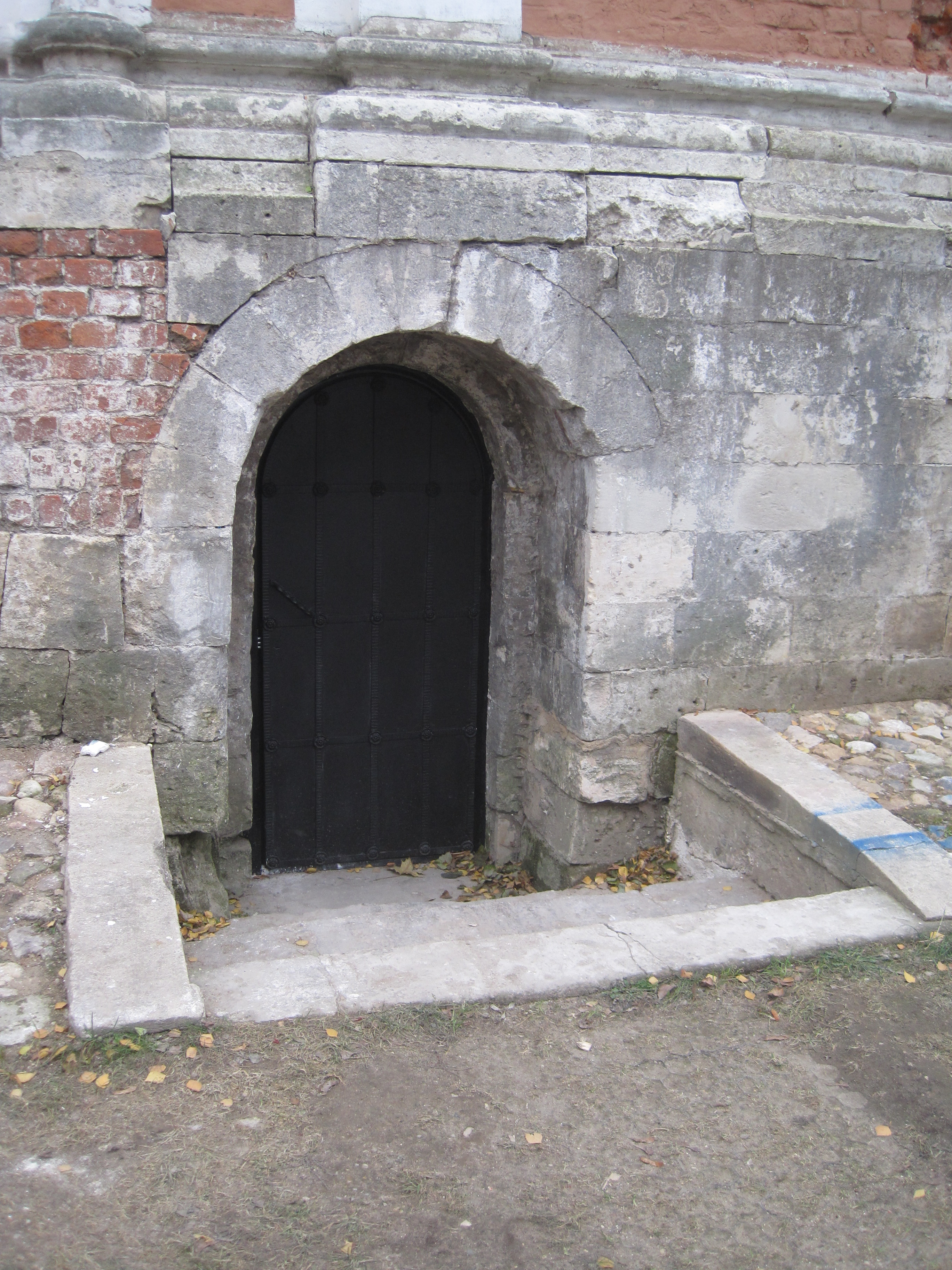 Подклет 14 века